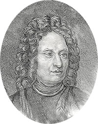 Henric Hammarberg (1686-1768)